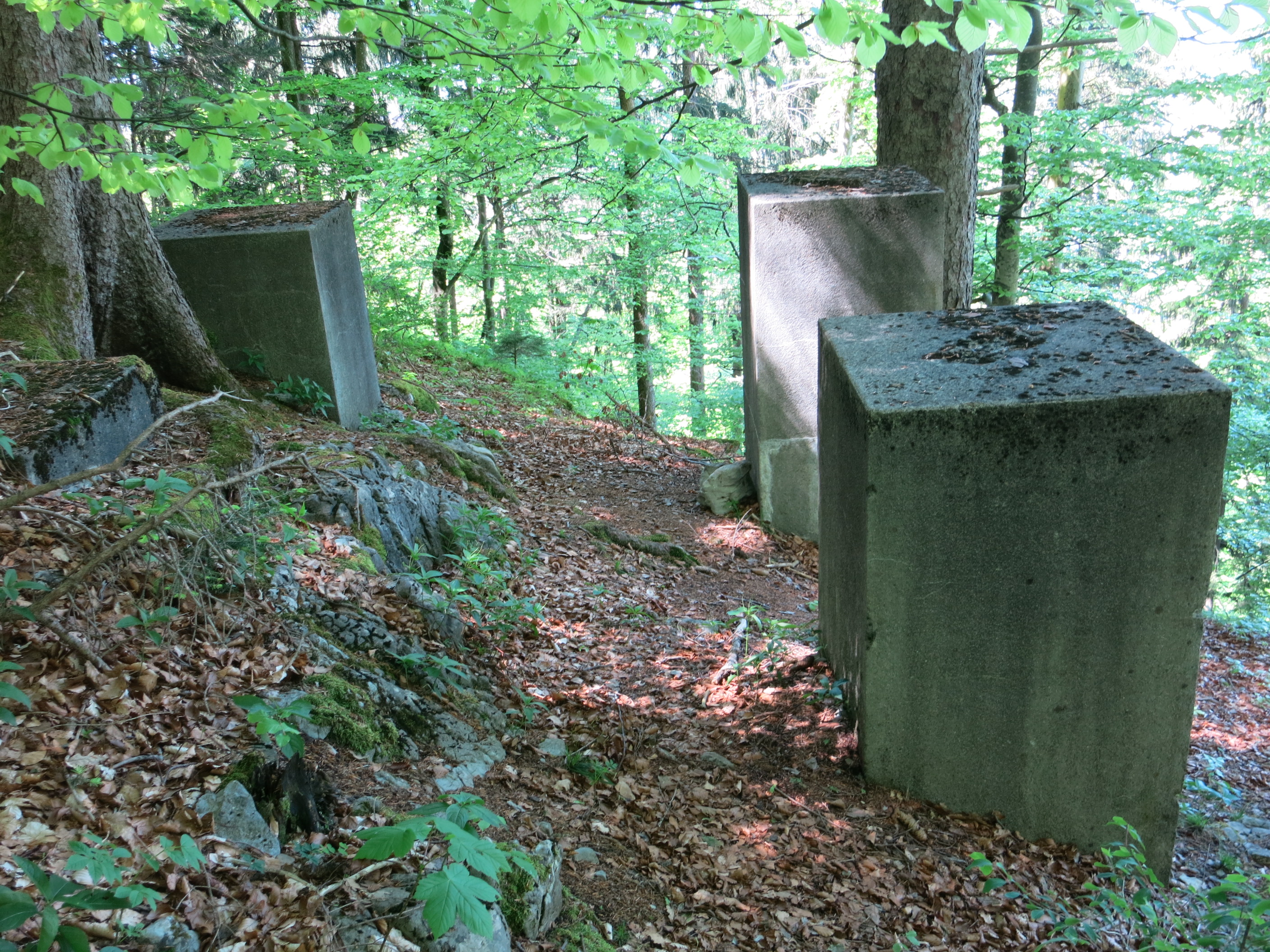 KP Heinrich, Spiez BE, Schweiz